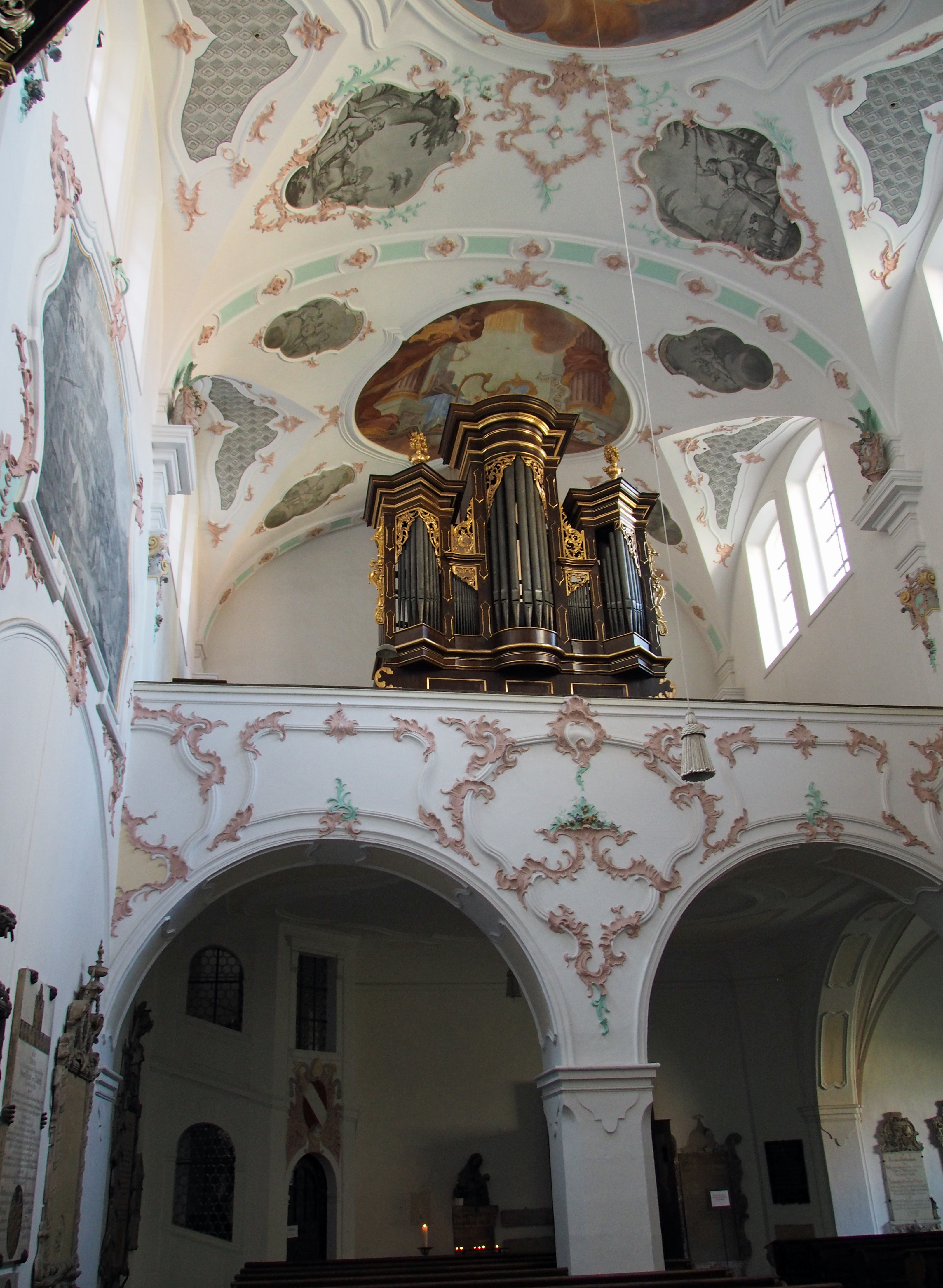 St. Rupert-Kirche, Orgelempore, Emmeramsplatz, Regensburg